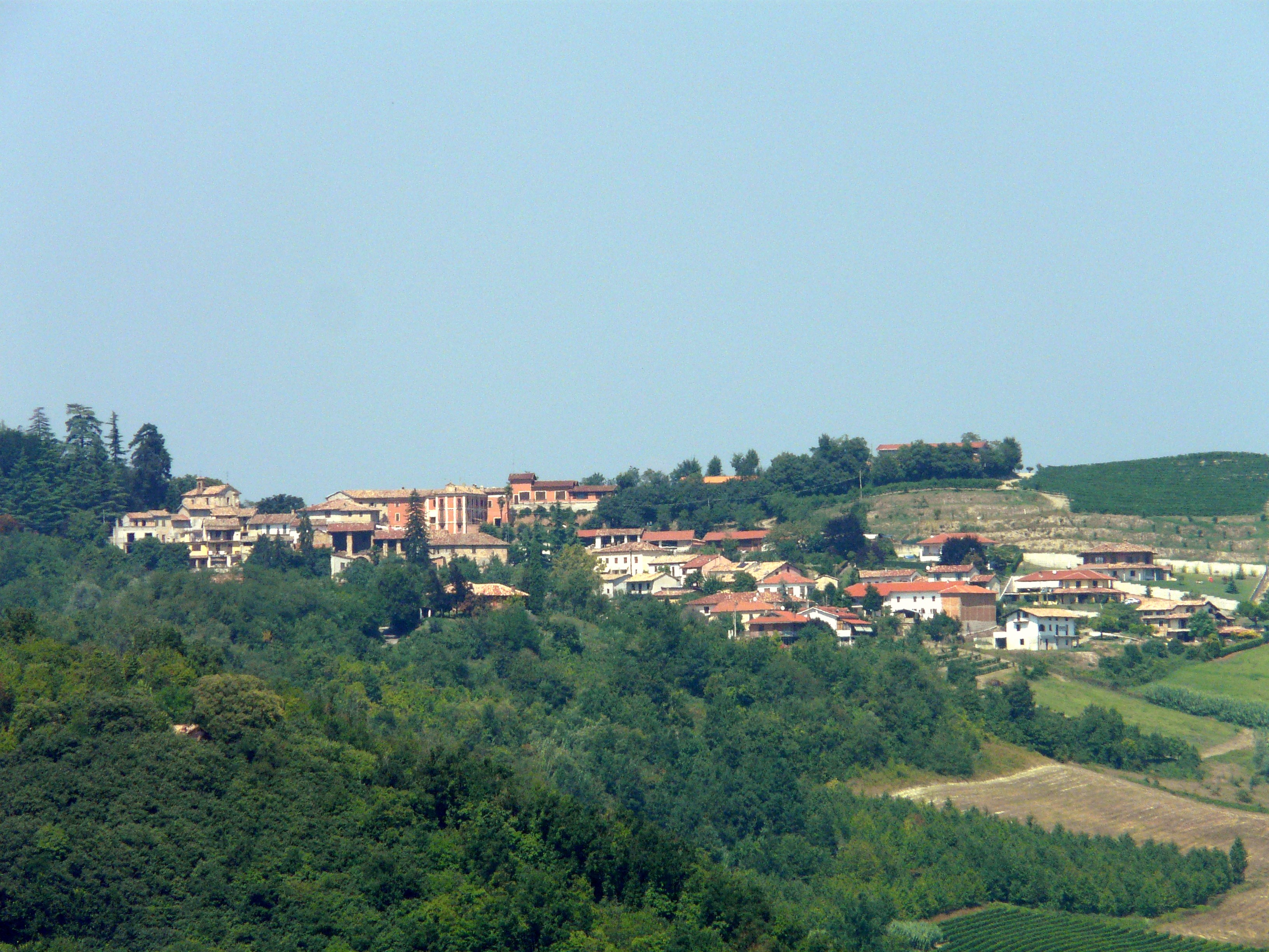 Ponzano Monferrato, Piemonte, Italia